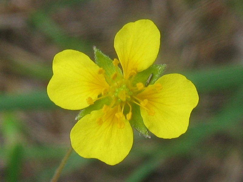 Blutwurz Potentilla erecta, Zingst